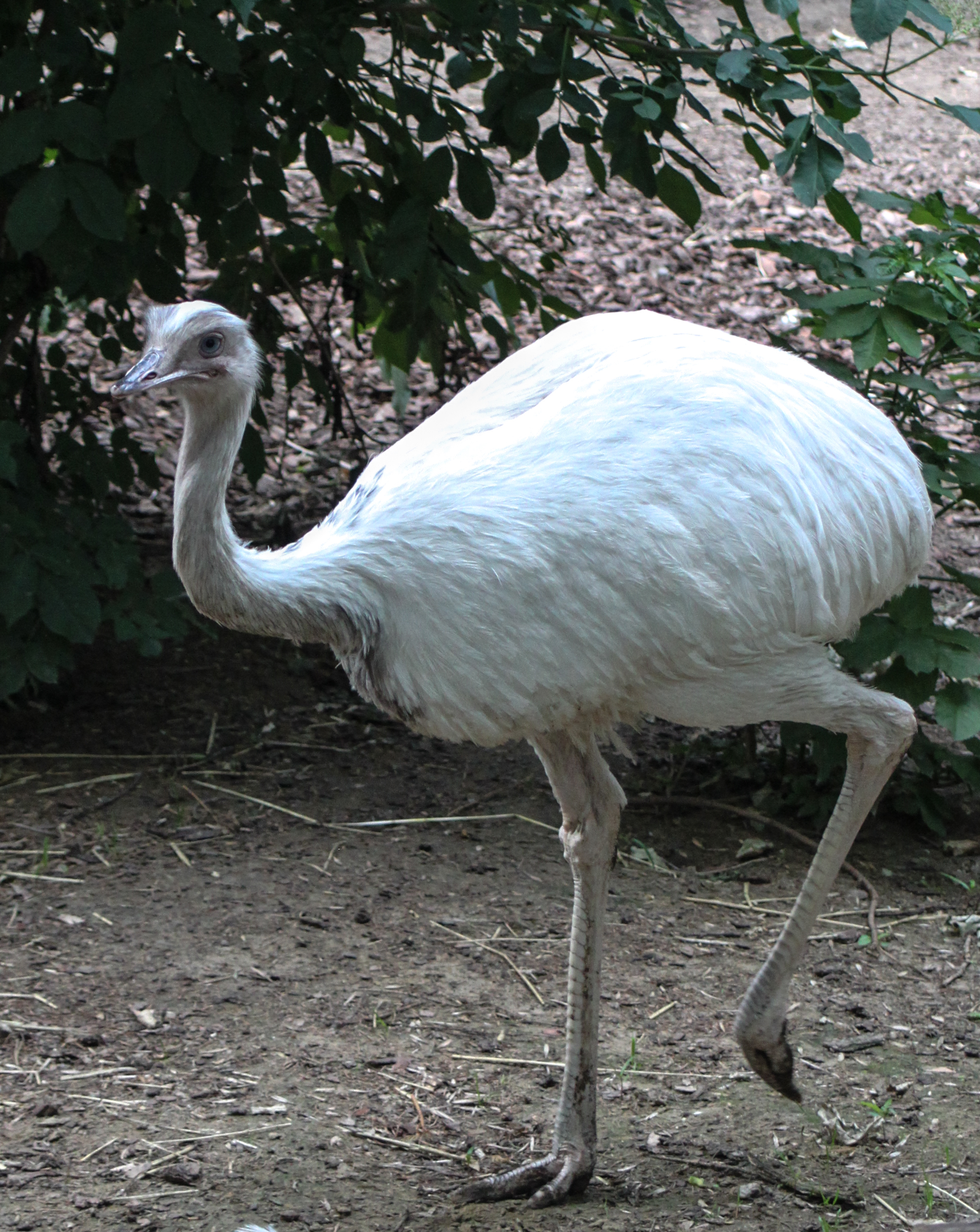 Nyíregyháza Zoo, nandulabel QS:Len,"Nyíregyháza Zoo, nandu" label QS:Lhu,"Nyíregyházi Állatpark, nandu"